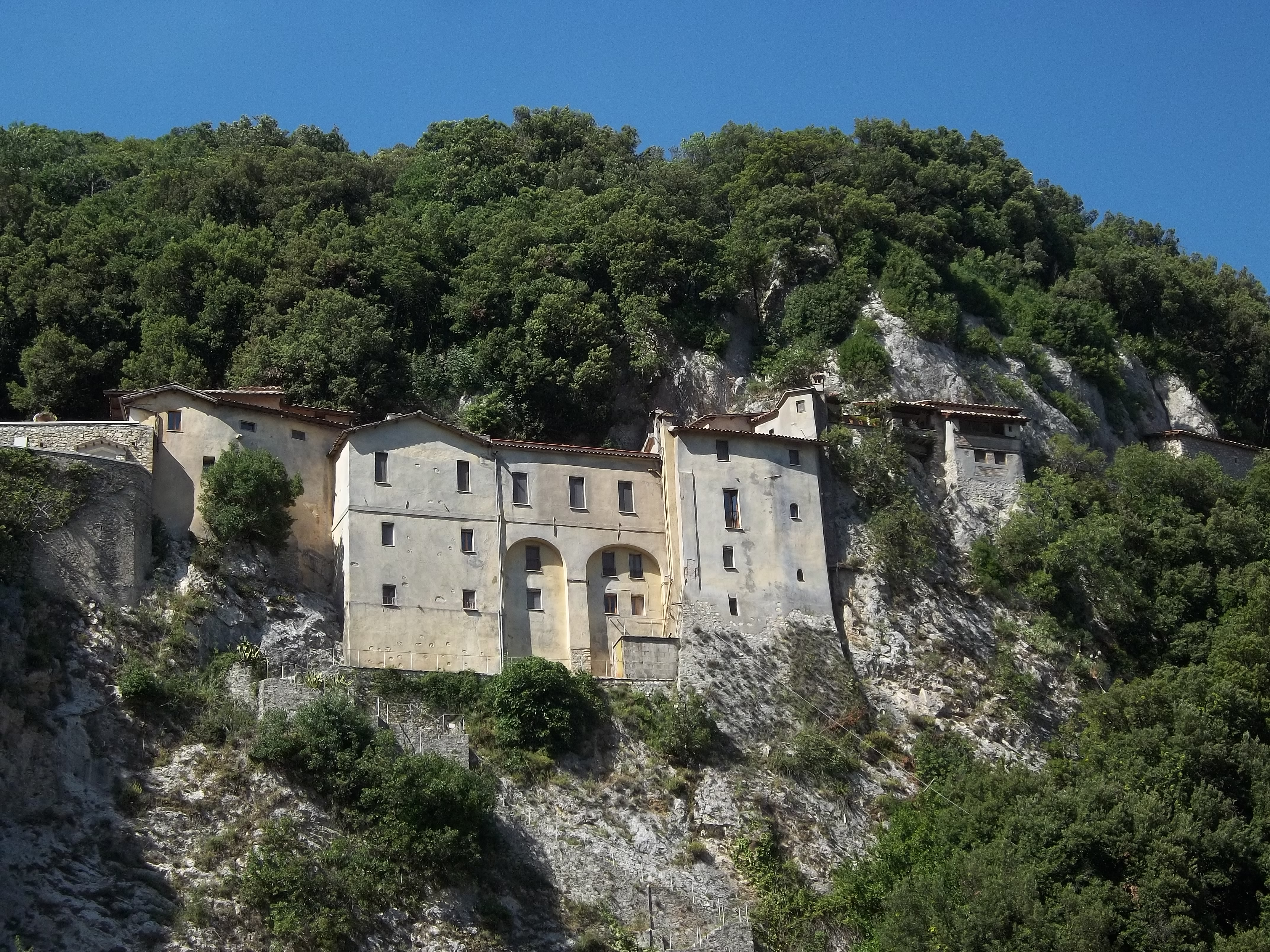 Greccio - Santuario del Presepe - San Francesco